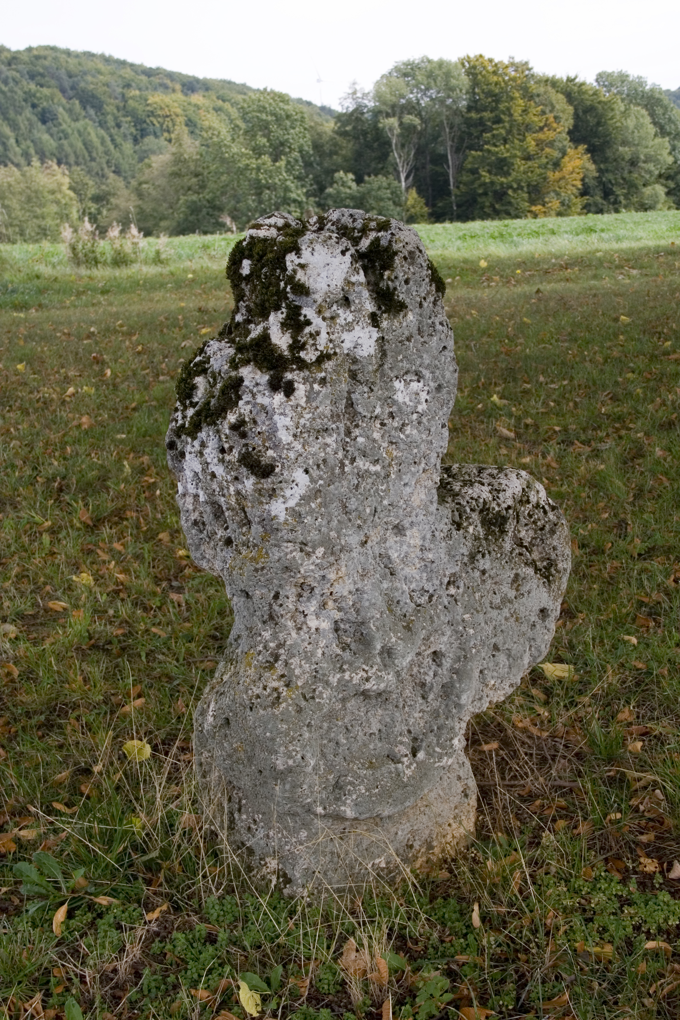 Steinkreuz